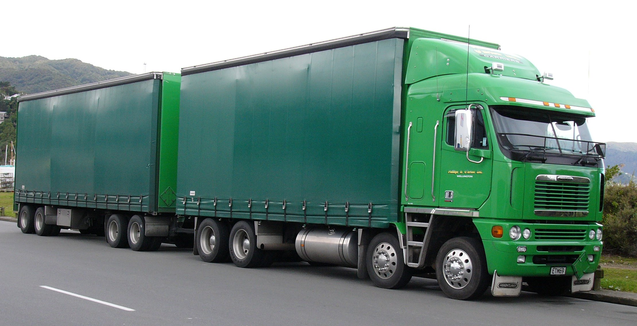 2008 Freightliner Argosy